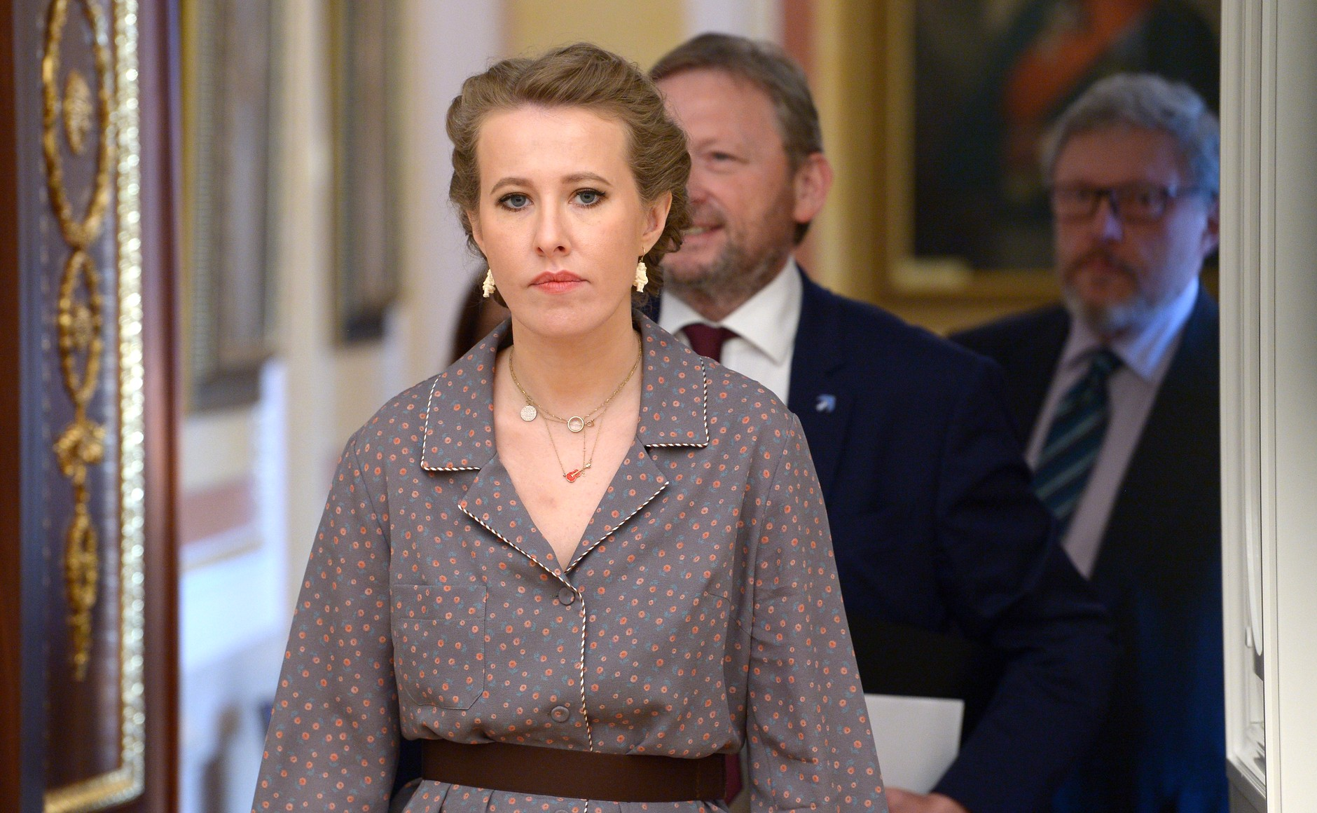 Кандидат от всероссийской политической партии «Гражданская инициатива» Ксения Собчак перед встречей с Владимиром Путиным